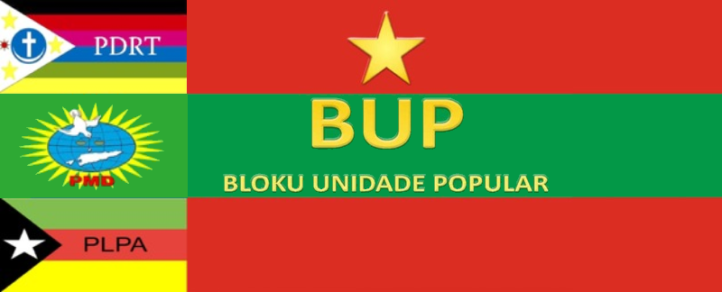 Tetun: Bloku Unidade Popular, 2017